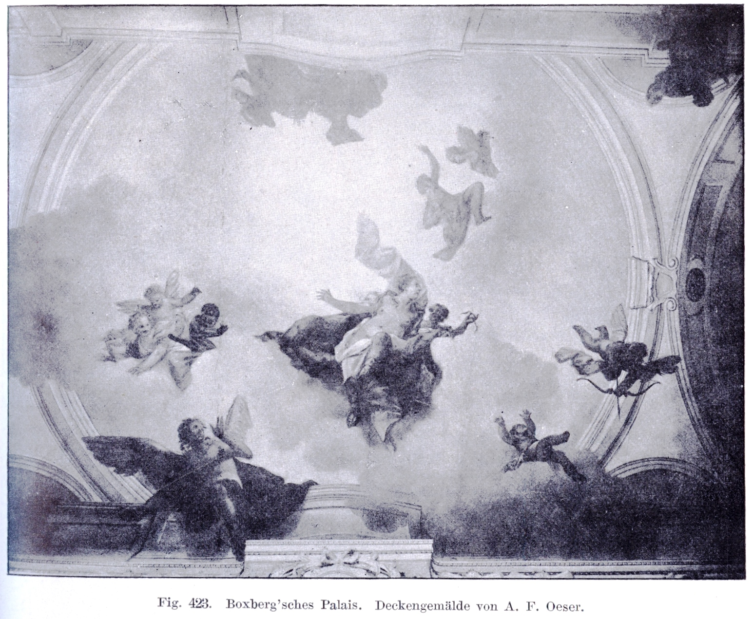 Deckengemälde von Adam Friedrich Oeser (1717–1799)